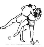 Auteur : Alain DELMAS - Dictionnaire encyclopédique du Thaing (Bando) 1999 - Copyright France 2006